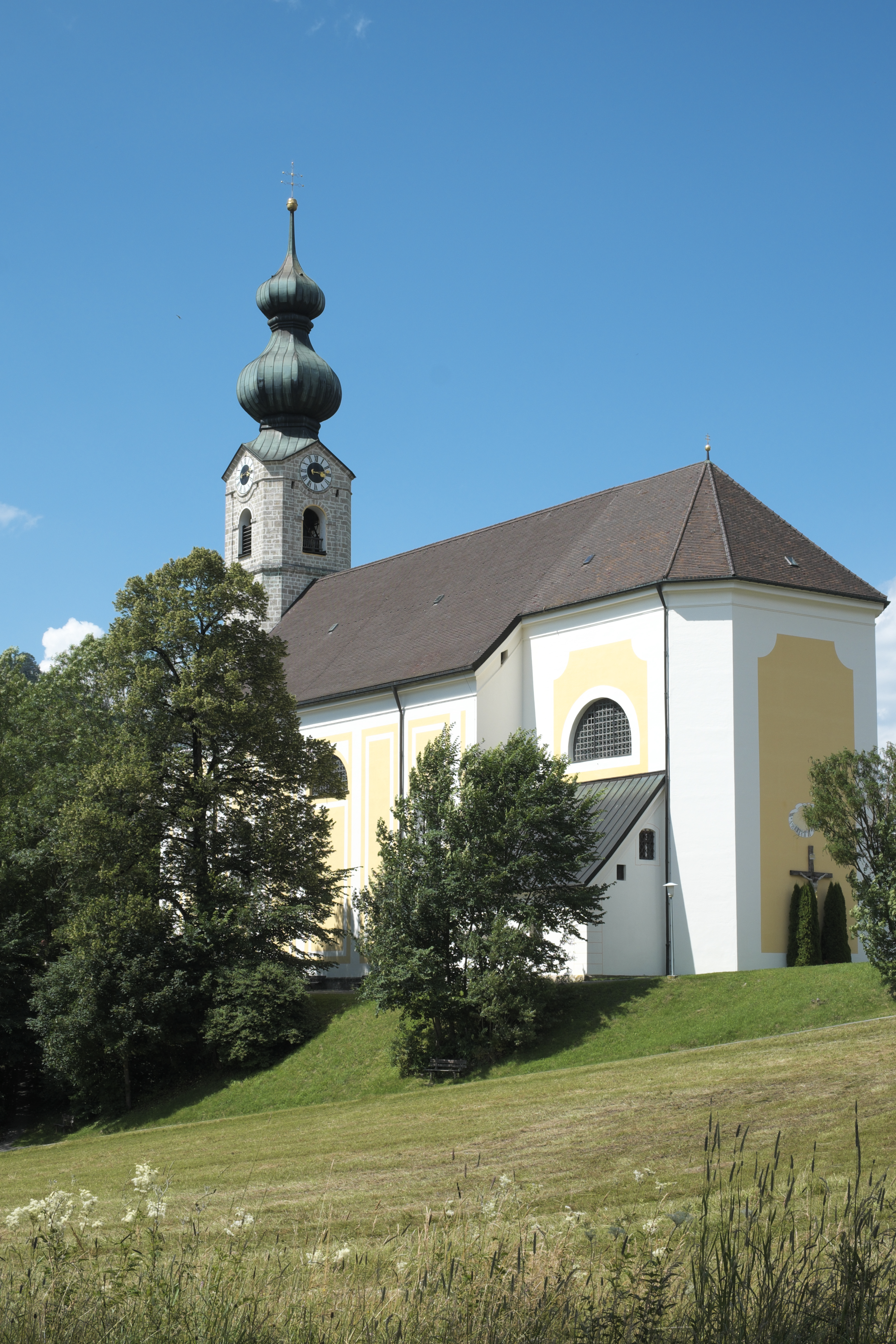 Katholische Pfarrkirche St. Georg in Ruhpolding im Landkreis Traunstein (Bayern/Deutschland)